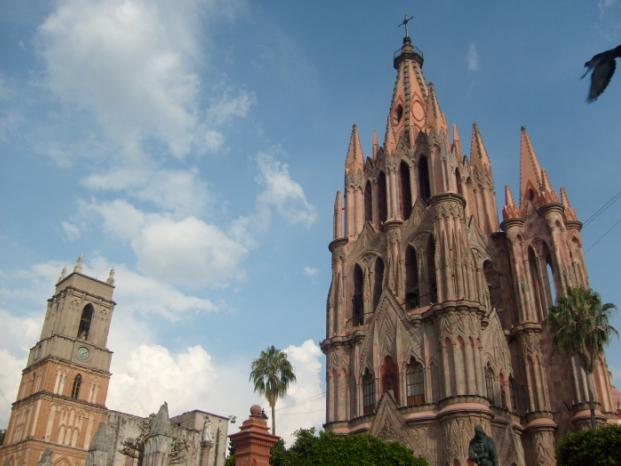 Parròquia de Sant Miquel Arcàngel, a San Miguel de Allende.